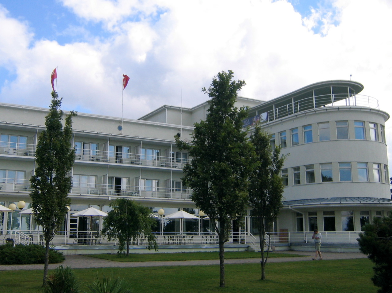 Pärnu, Estonia: Rannahotell.